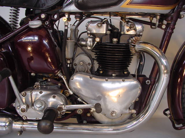 Triumph 500 cc 5T Speed Twin motorcycle engine from 1937.